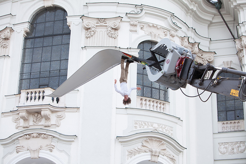 ENGEL 2015 Foto: Lawine Torren / Magdalena Lepka